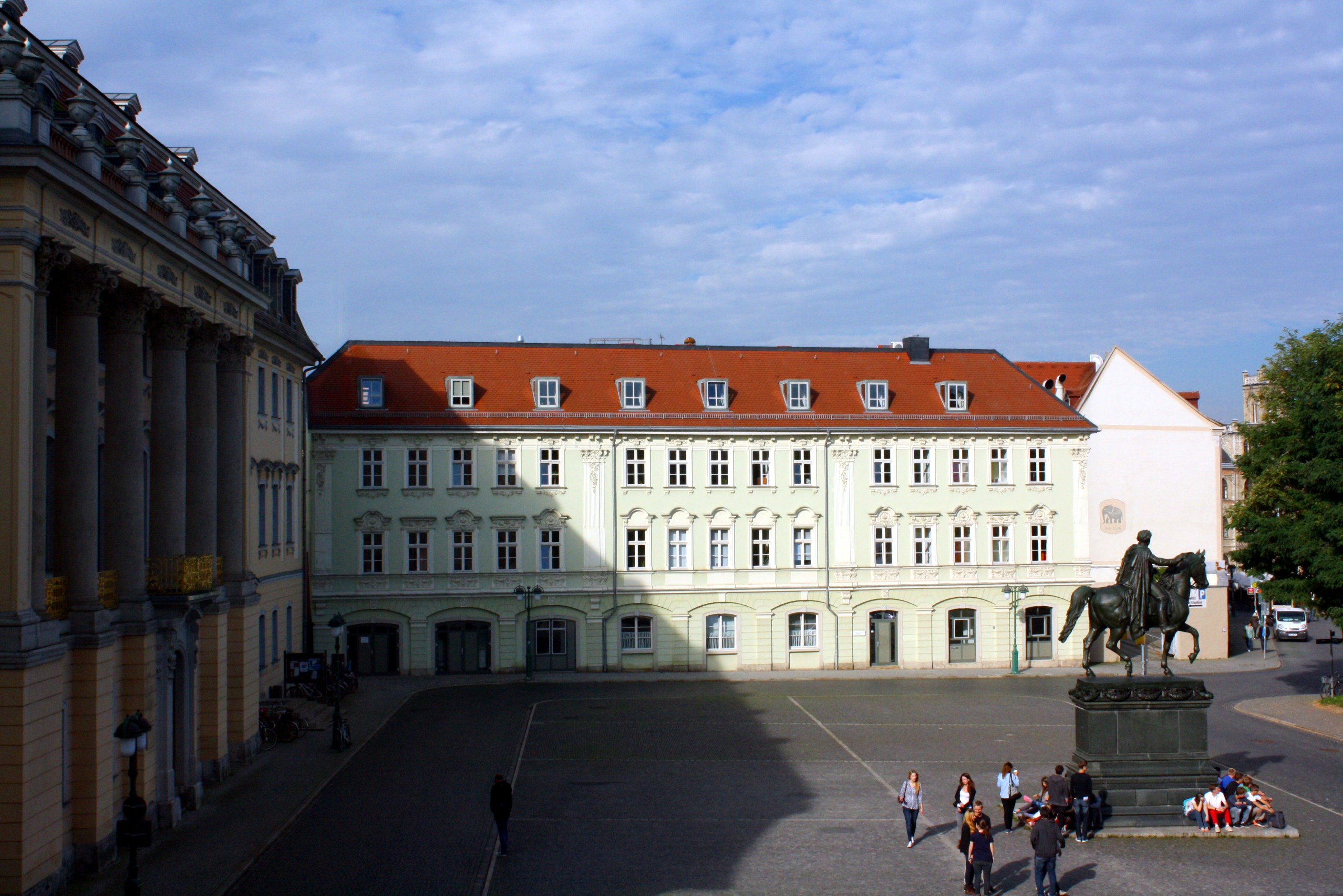 Rößlersches Haus auf dem Weimarer Platz der Demokratie 3